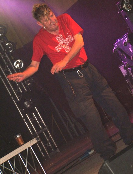 Krisma in concerto a Pasian di Prato (UD) il 9 giugno 2007.